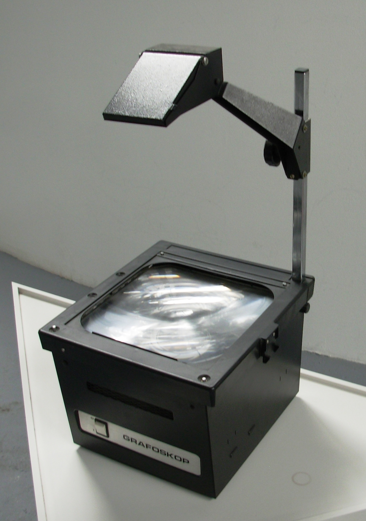 Grafoskop, uređaj za prezentacije. Snimio u Muzeju Tehnike u Beogradu Goldfinger